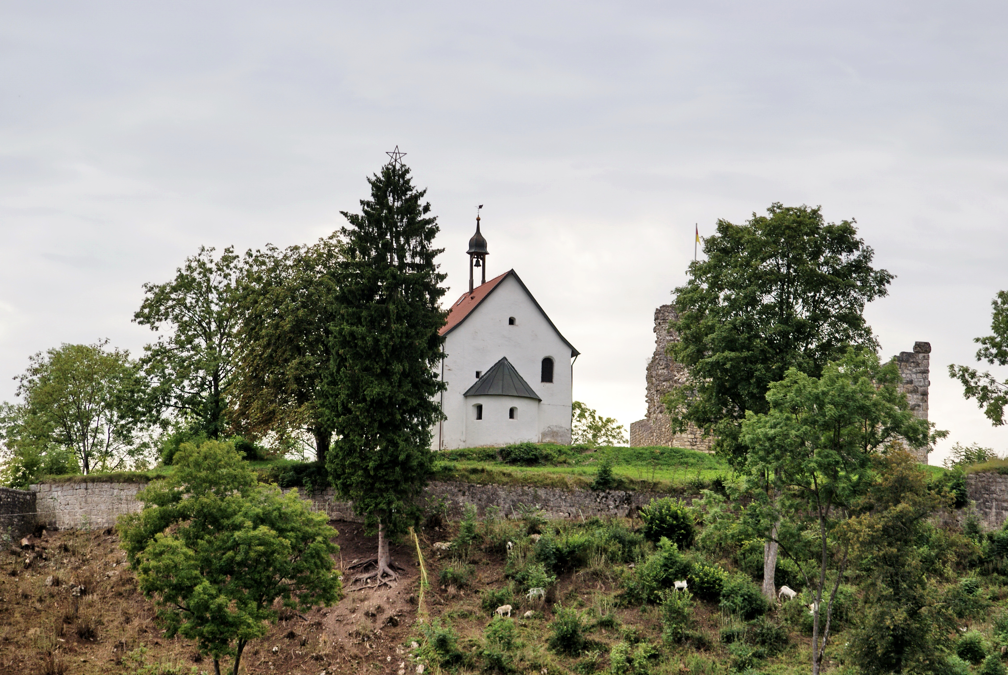 Veringenstadt Burgruine mit Peterskapelle. (Blick aus Osten)